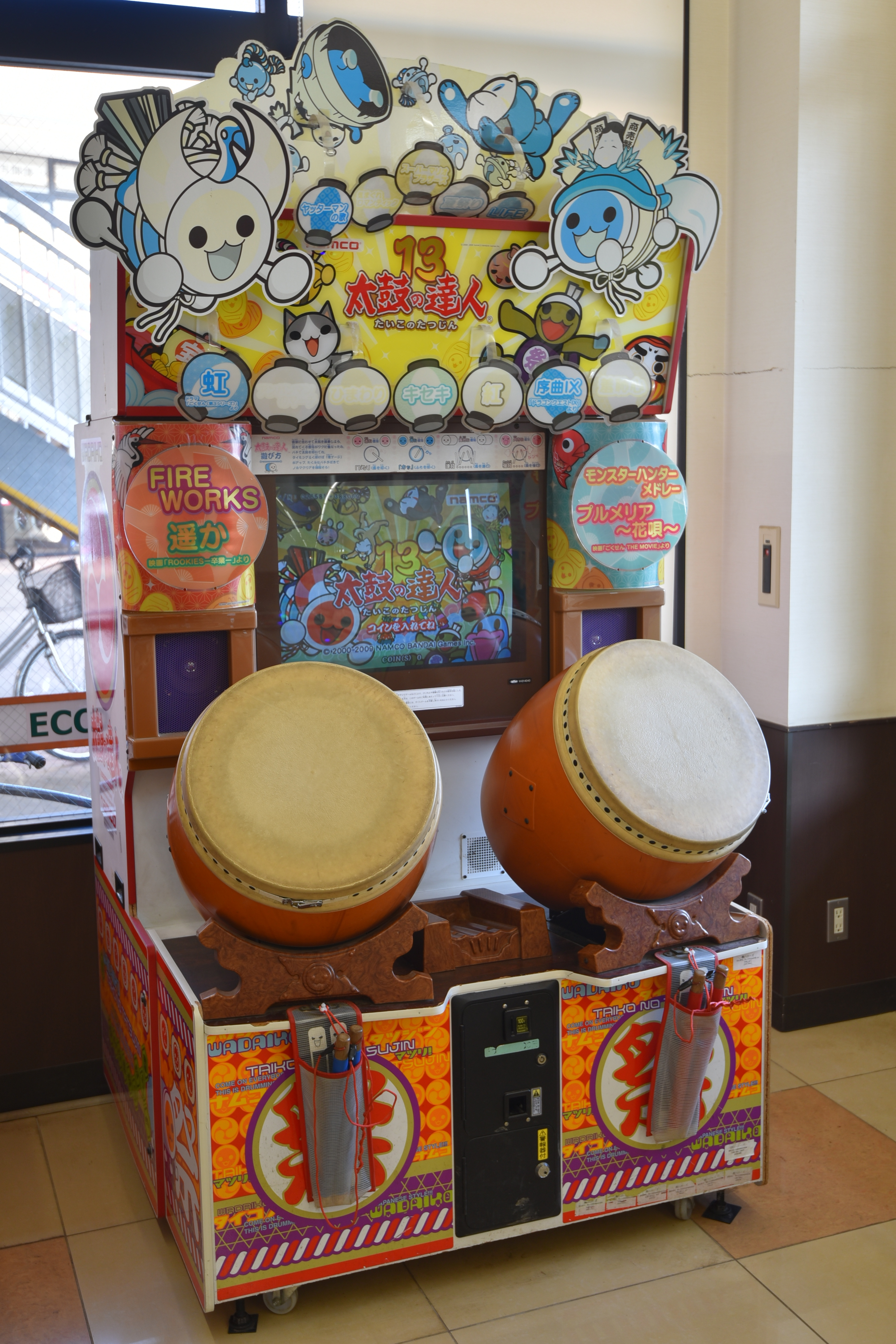 アーケードゲーム版『太鼓の達人13』（ナムコ）の筐体。いわゆる旧筐体とよばれるもの。